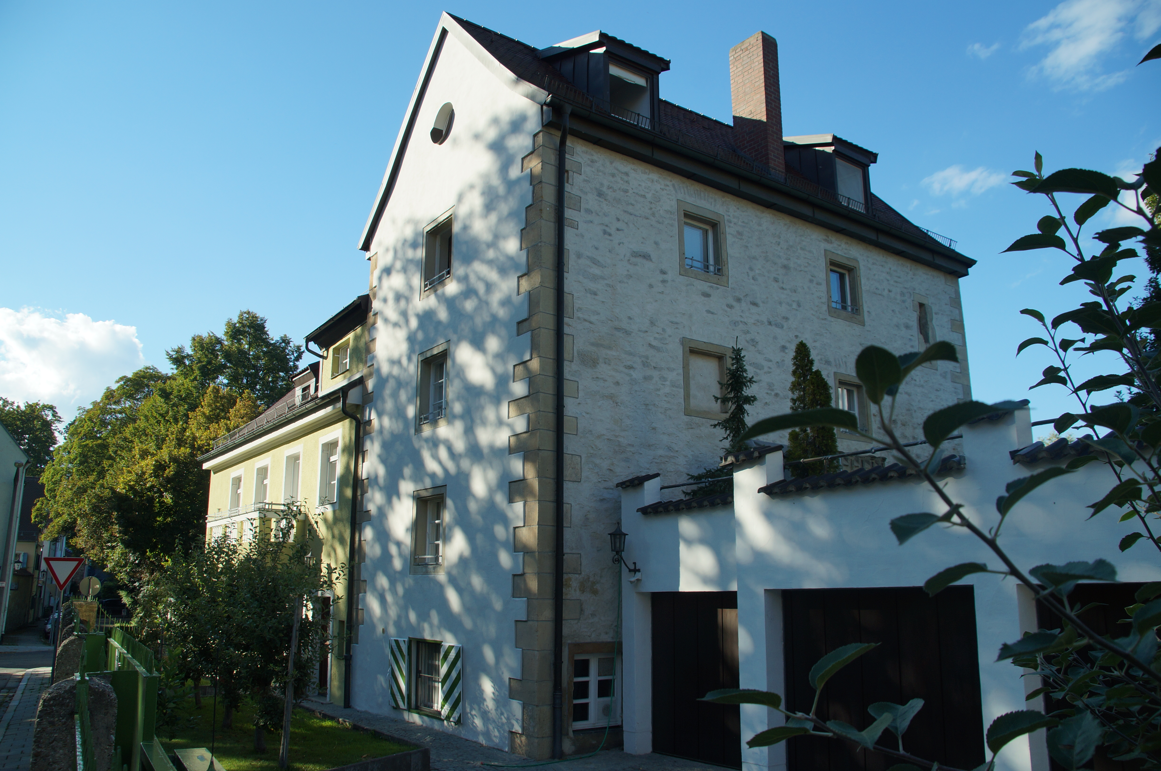 Turm III, dreigeschossiger und giebelständiger Satteldachbau, Bruchstein, um 1320, mit südlichem Anbau, 15. Jahrhundert und Inschrifttafel zum Mauerbau, bez. 1320; This is a photograph of an architectural monument.